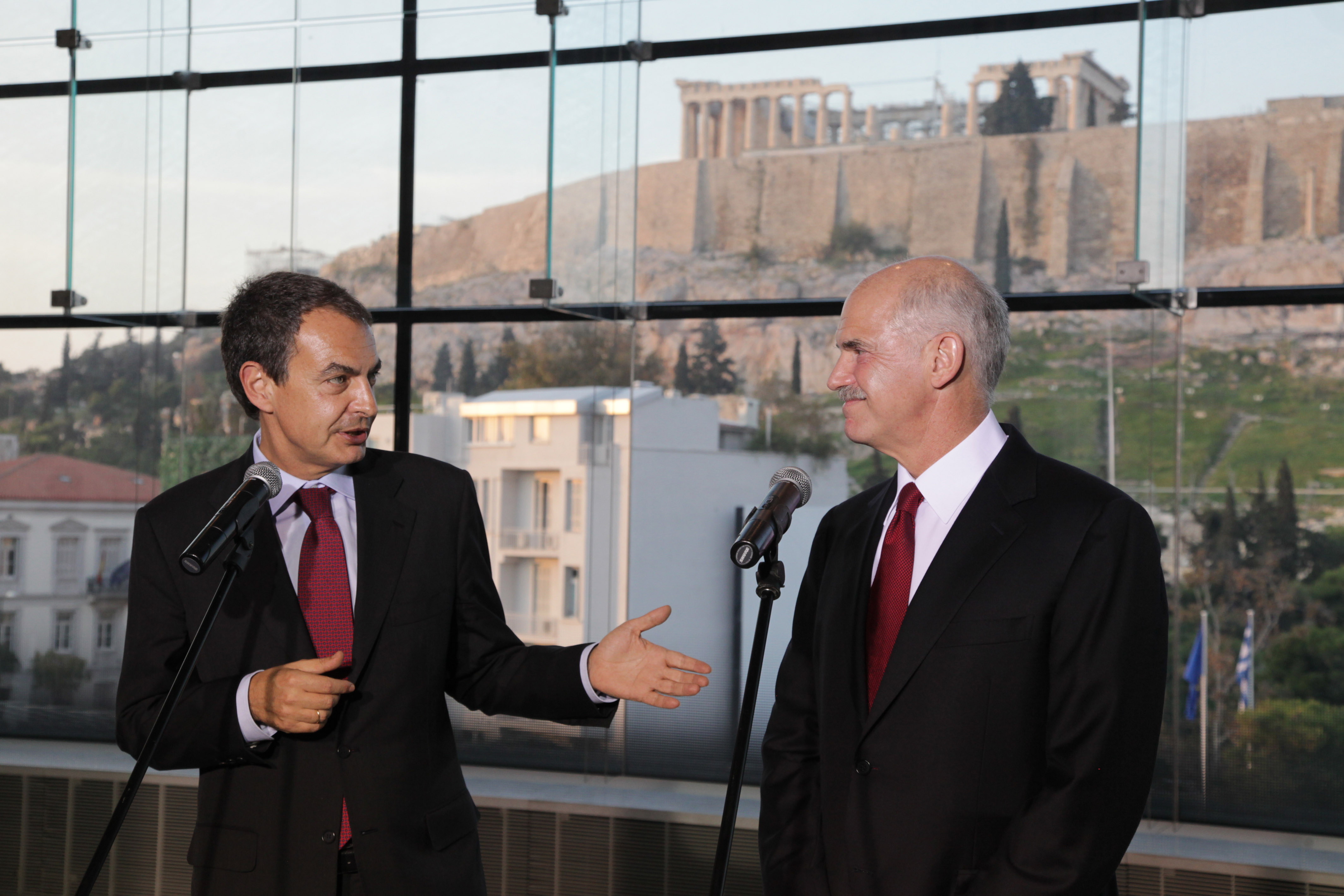 José Luis Rodriguez Zapatero con Yorgos Papandreu en el Nuevo Museo de la Acrópolis. 25 de noviembre de 2010.